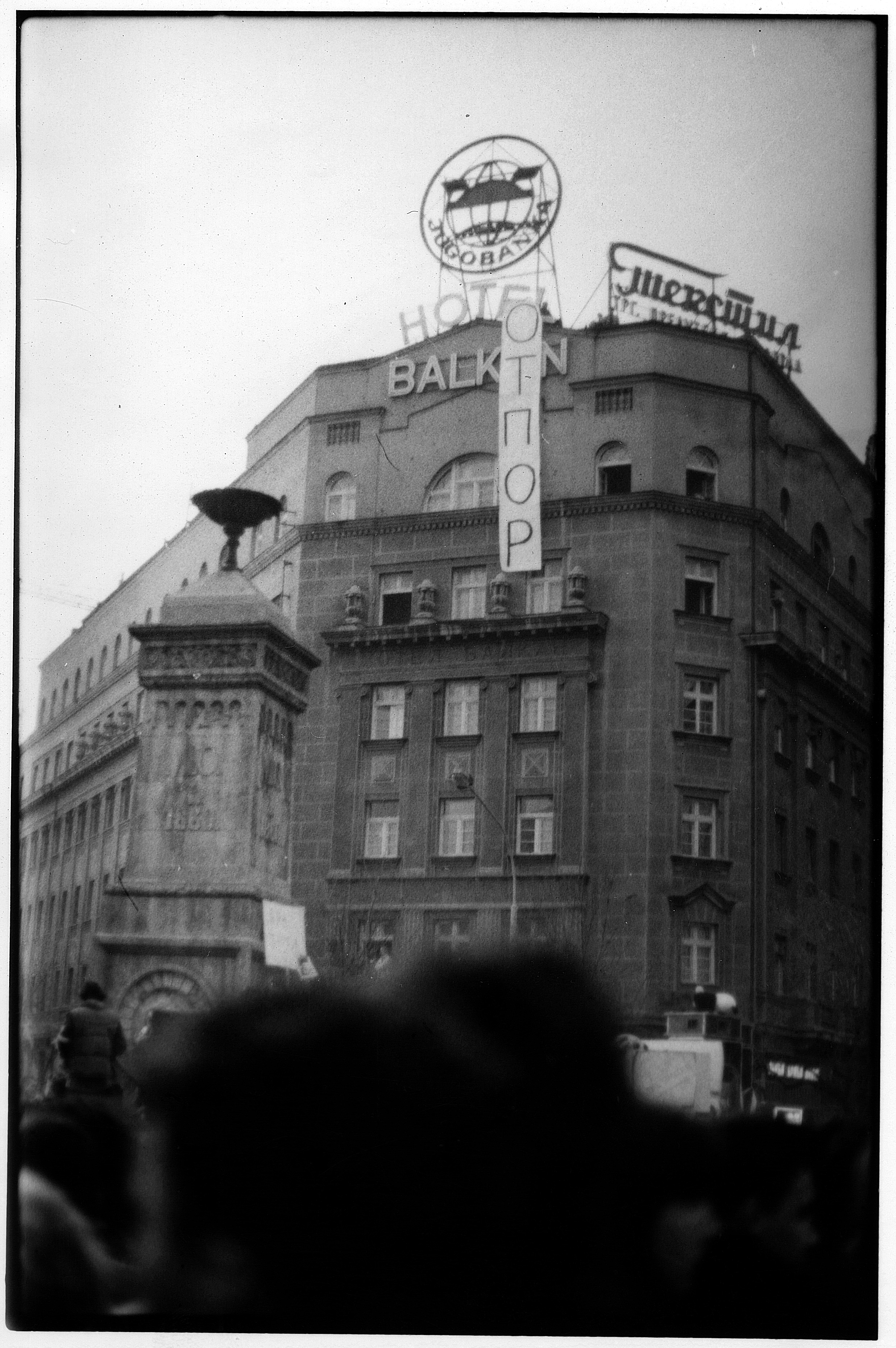 Студентске демонстрације код Теразијске чесме, 1991. Аутор снимка Ранко Томић.